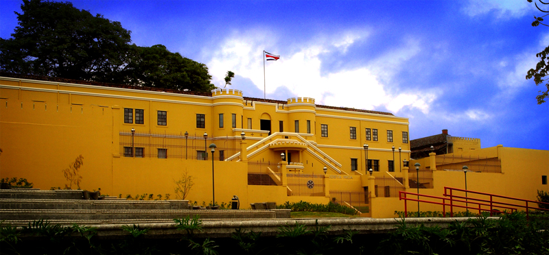 Vista del Museo Nacional desde la Plaza de la Democracia.